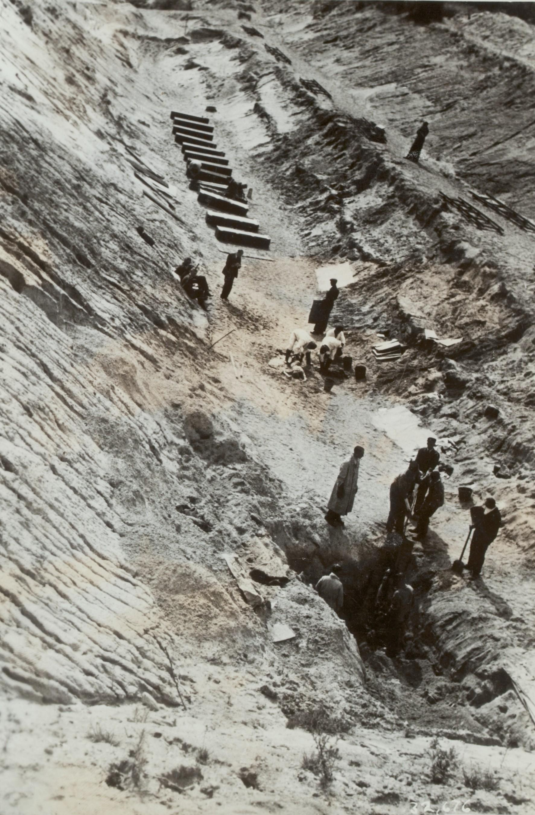 Slachtoffers kamp Amersfoort. De groeve waarin 49 lijken werden gevonden. Vele slachtoffers waren gedood met lichtkogels waardoor ze levend verbrandden. Fotocollectie Rijksvoorlichtingsdienst Eigen